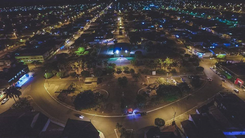 Foto panorâmica de Acreúna